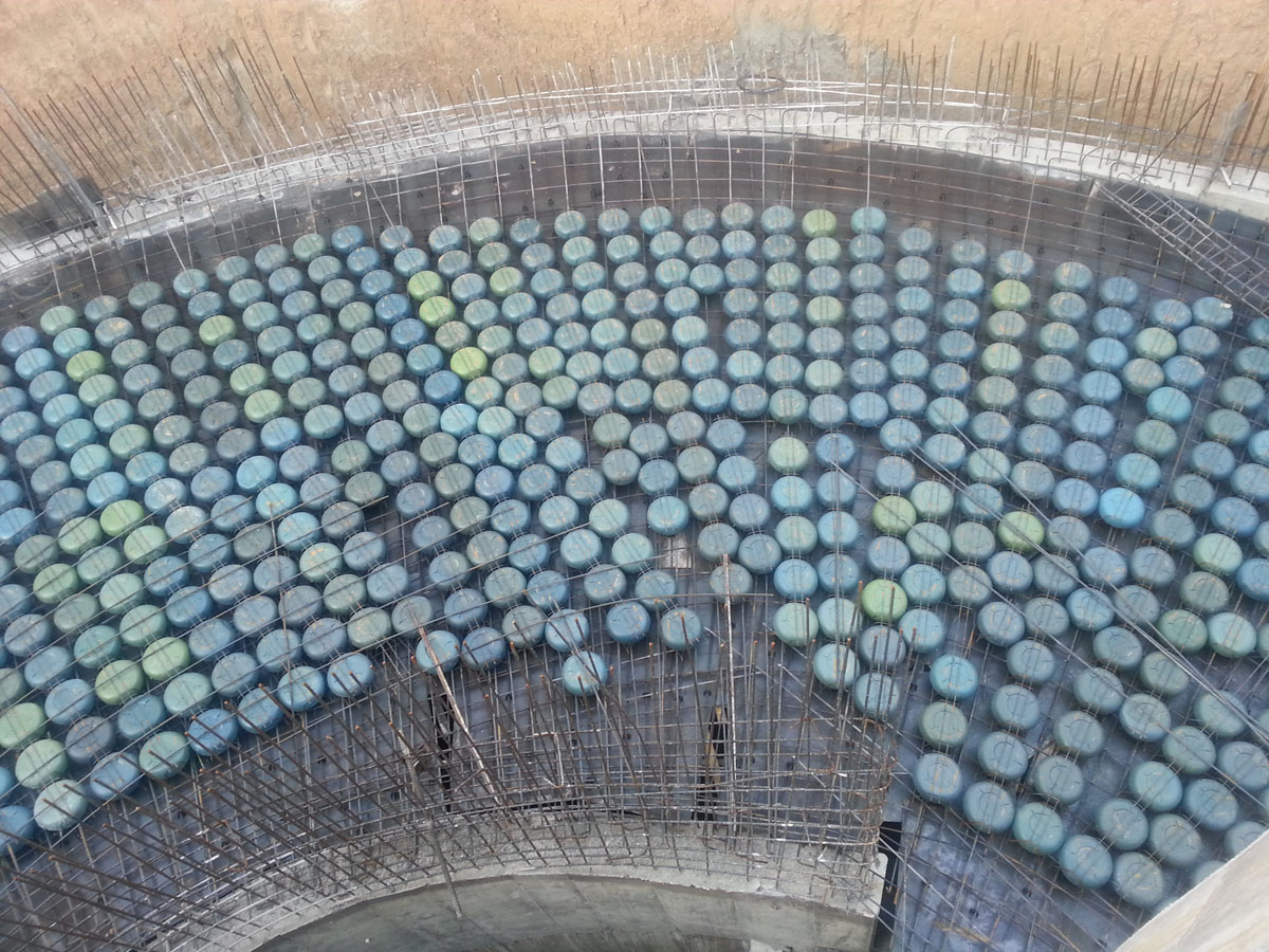 Cobiax Roof